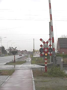 Overweg tussen Zwijndrecht en Melsele